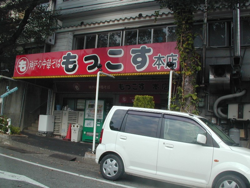 兵庫県神戸市中央区にあるラーメン店、もっこす総本店